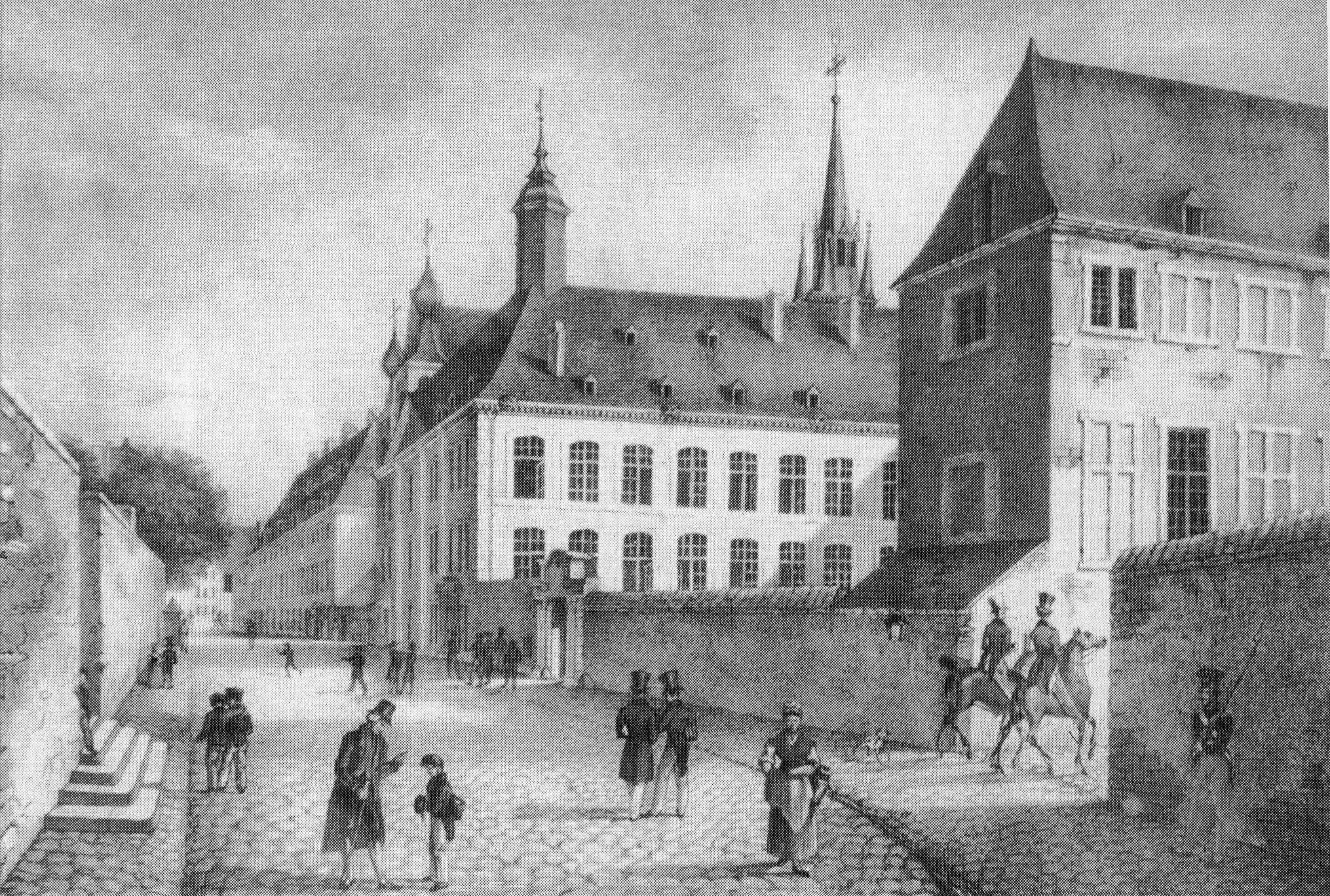 De Stater Kolléisch 1828. Kategorie:Klasséiert Monumenter an der Gemeng Lëtzebuerg Kategorie:Gebaier an der Stad Lëtzebuerg Kolleisch